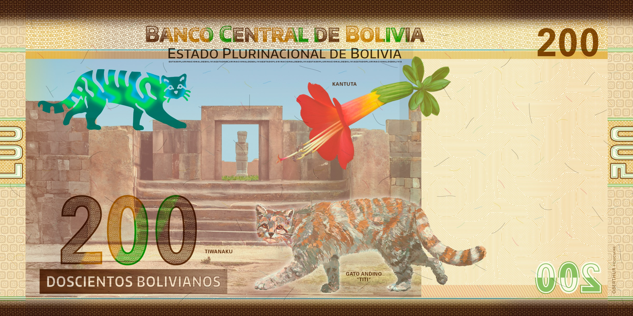 Nuevos Billetes Estado Plurinacional de Bolivia